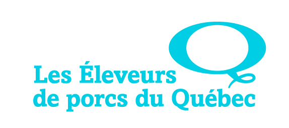 Logo des Éleveurs de porcs du Québec